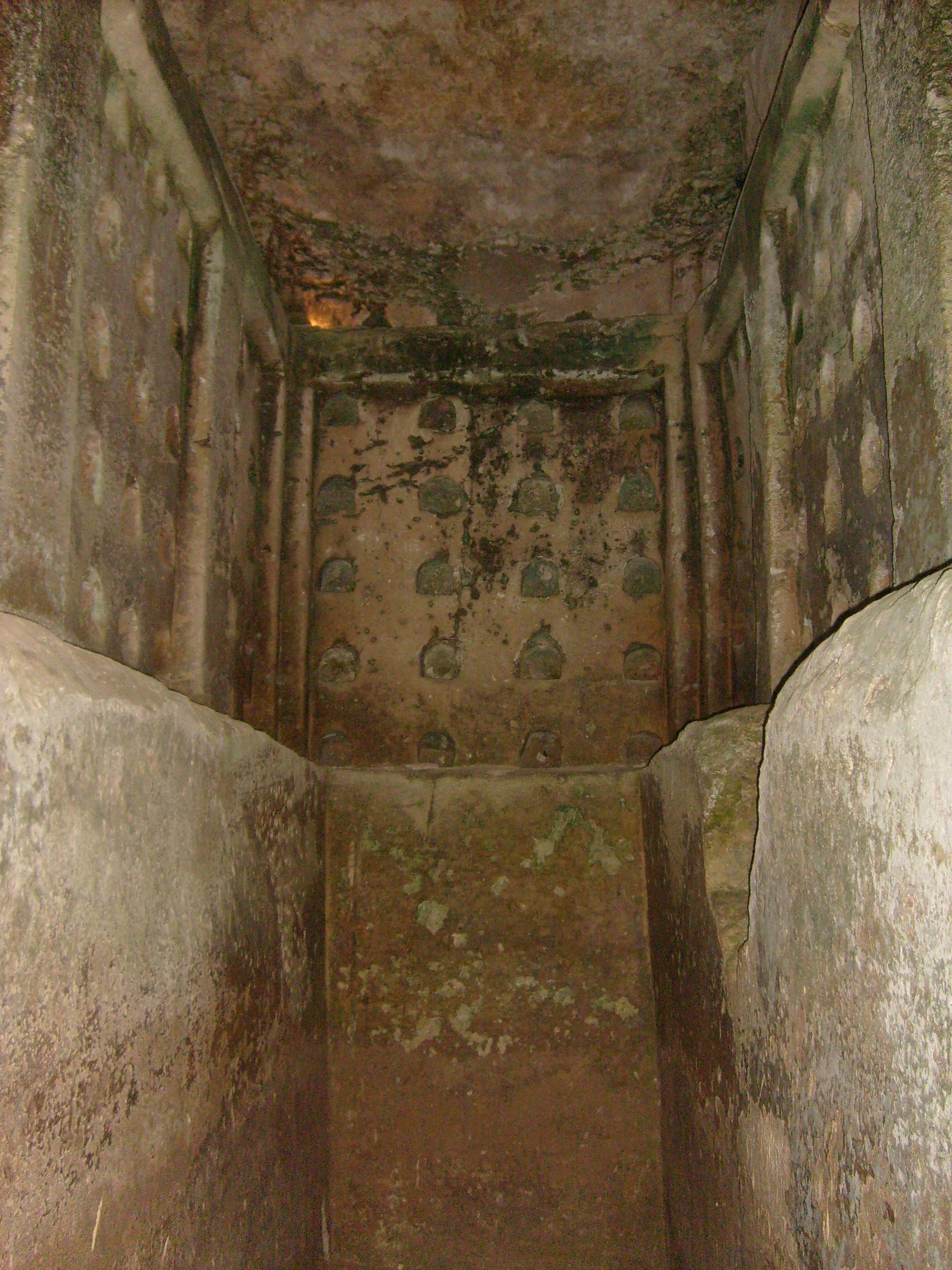 מערת קולומבריום במראשה